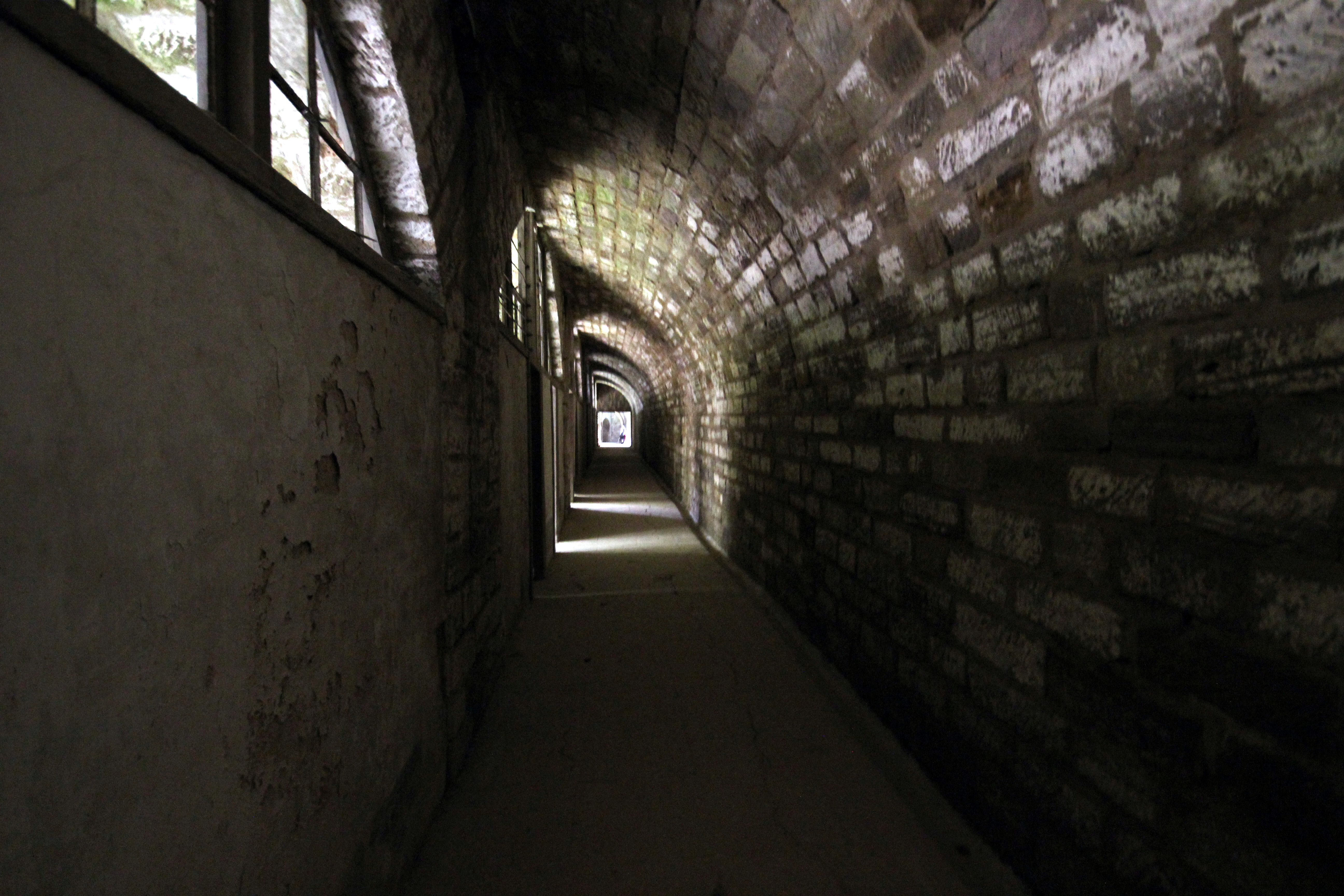 La galerie d'accès aux ateliers de chargements du fort de Bois l'Abbé